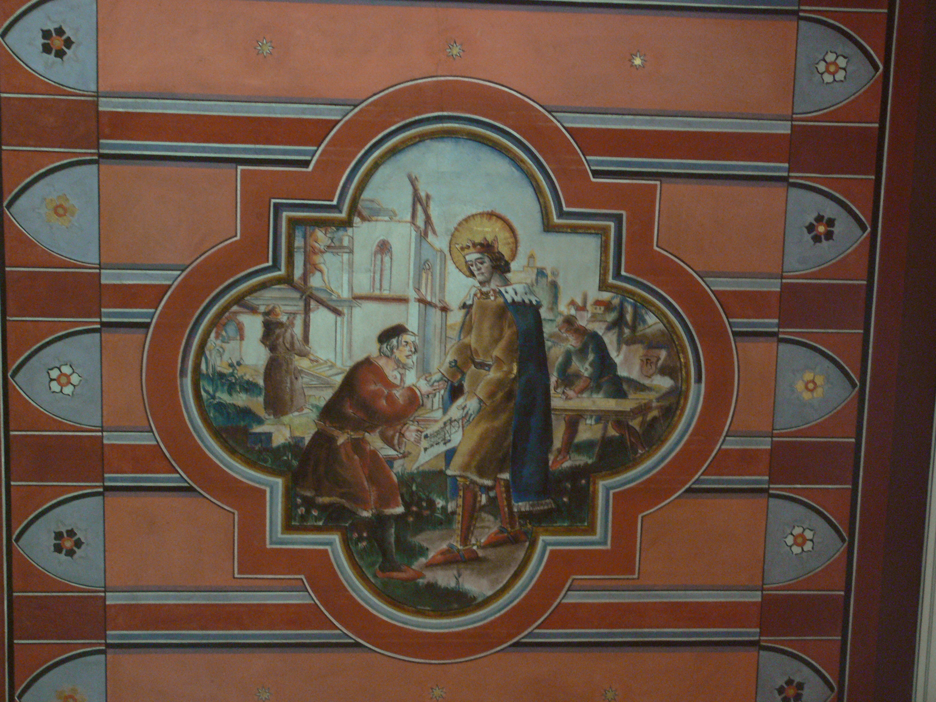 Hepbach (Ortsteil von Markdorf), Bodenseekreis, Baden-Württemberg Pfarrkirche St. Sigismund Detail der Decke, Szene aus der Sigismund-Legende (?)